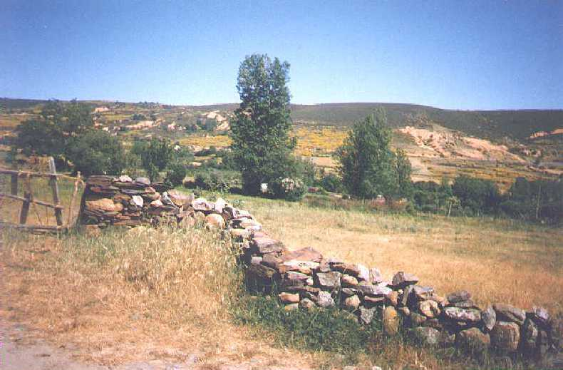 Un prado a orillas del Pueblo